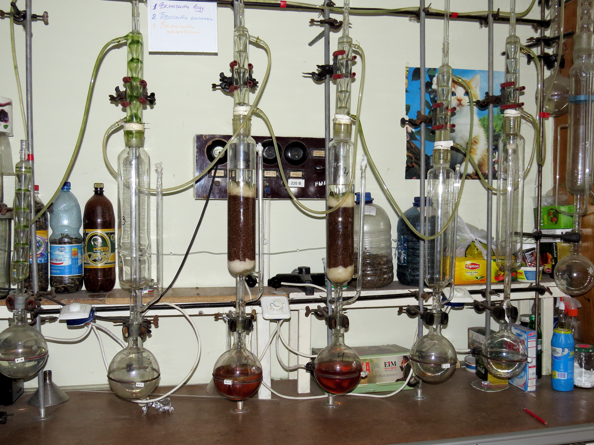 Киевский университет им. Т. Шевченко. Лаборатория химии природных соединений. Экстракторы